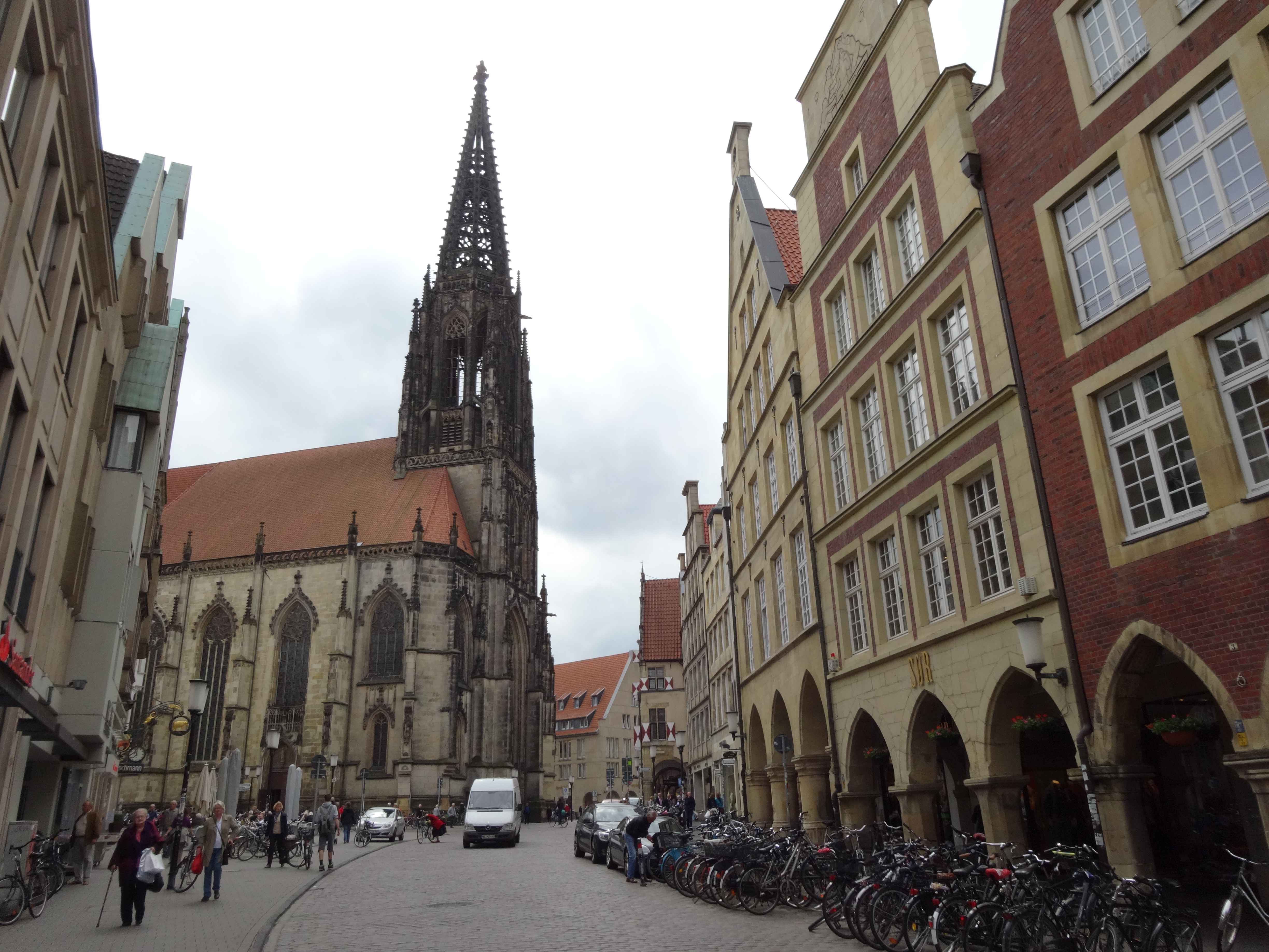 Münster, Germany